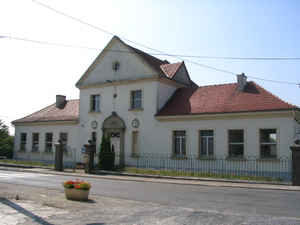 Façade de la mairie de Bouchavesnes-Bergen, entourée de l'école communale.